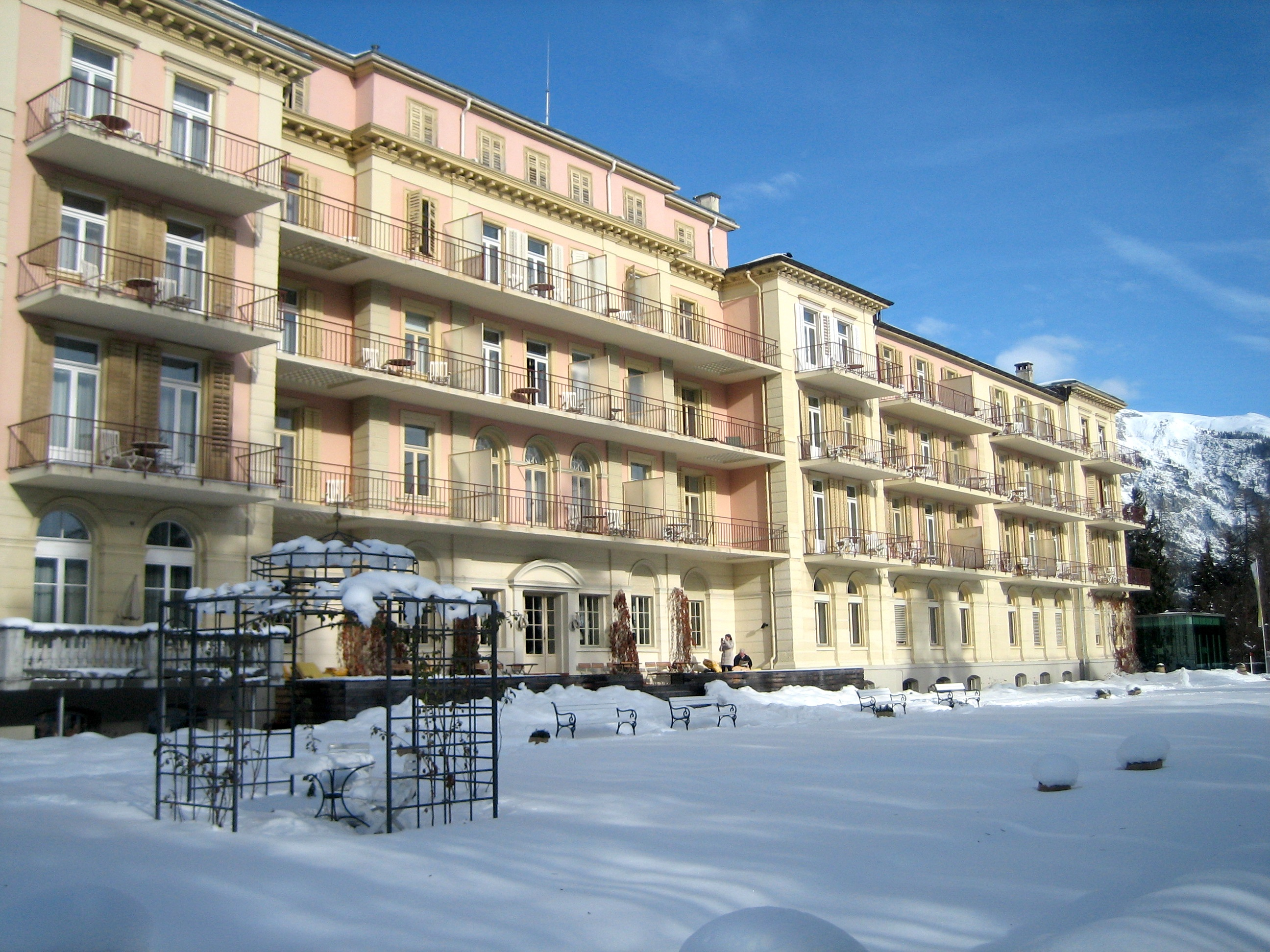 Waldhaus Flims: Südfront